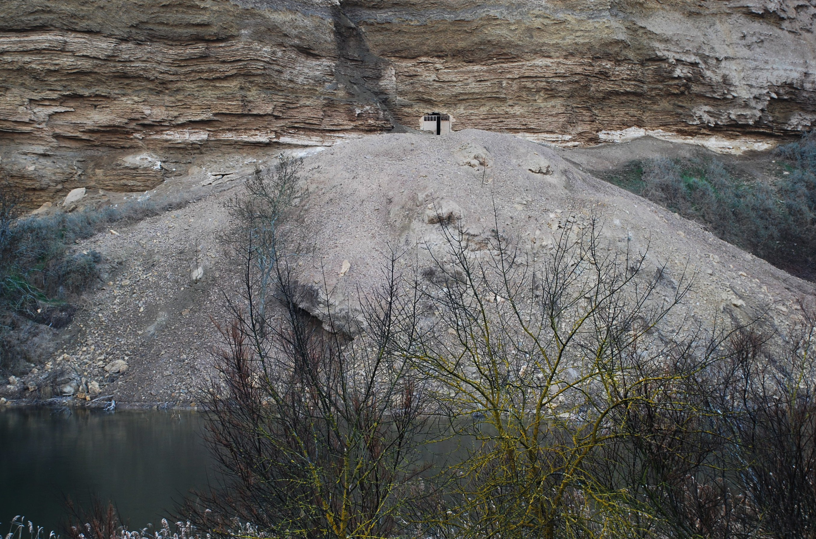 Minas de glauberita en Alcanadre, La Rioja, España.